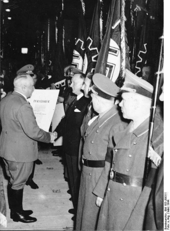 Auszeichnung von Kriegsmusterbetrieben durch Robert Ley 134 neue Kriegsmusterbetriebe. Die Reichsarbeitskammer hielt in der Werkhalle eines grossen Rüstungsbetriebes unter Teilnahme von Tausenden von Arbeitern und Arbeiterinnen eine Tagung ab, die sich zu einem feierlichen Appell gestaltete. Im Mittelpunkt der Tagung stand die Auszeichnung der leistungsbesten 134 Betriebsgemeinschaften aus dem ganzen Reich, als Kriegsmusterbetriebe. Die Ehrung wurde durch Reichsorganisationsleiter Dr. Ley und Reichsminister Funk, zugleich auch im Namen des Reichsministers Speer, verkündet. - Unser Bild zeigt Reichsorganisationsleiter Dr. Ley bei der Überreichung der Urkunden an die Betriebsführer der ausgezeichneten Betriebe. Scher Bilderdienst (DAF) 3.3.44 J 9311 Abgebildete Personen: Ley, Robert: Reichsorganisationsleiter, Deutsche Arbeitsfront (DAF), Generalrat der Wirtschaft, Deutschland